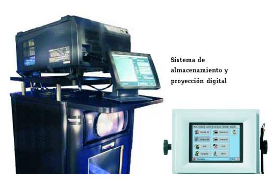 Sistema Almacenamiento Y proyeccion Digital